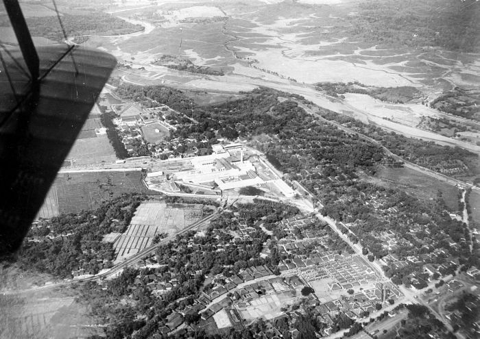 Repronegatief. Luchtfoto van de Suikerfabriek Kadipaten bij Cheribon